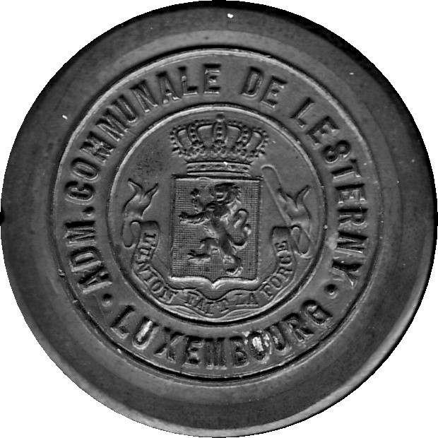 Sceau officiel de la commune de Lesterny (1907-1976), photographié et scanné par l'auteur en 2005 grâce à la collaboration du dernier bourgmestre de Lesterny.